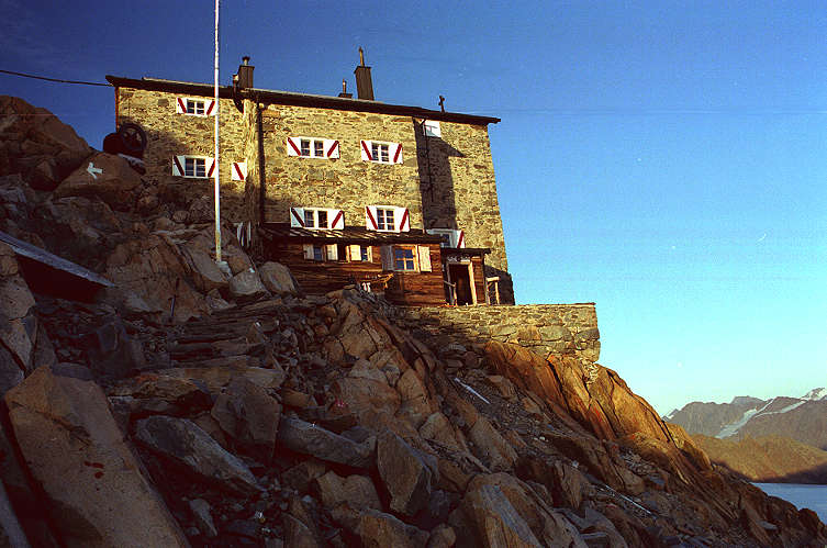 Brandenburger Haus (3272 m), DAVS Berlin, Ötztaler Alpen, Tirol, Österreich Photograph: Luidger (27. August 2000)